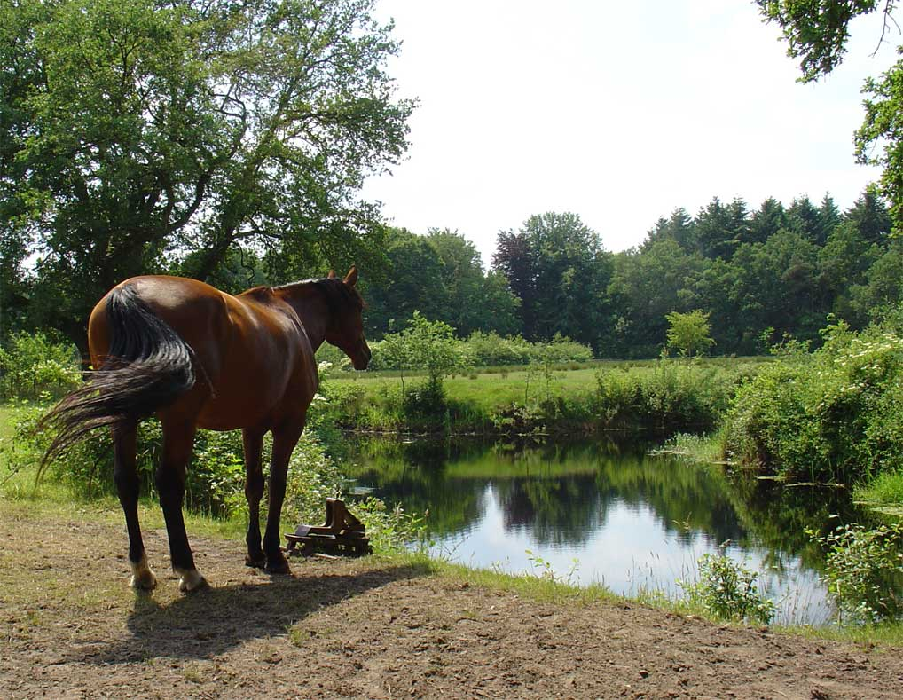 Westerveen nabij Peest